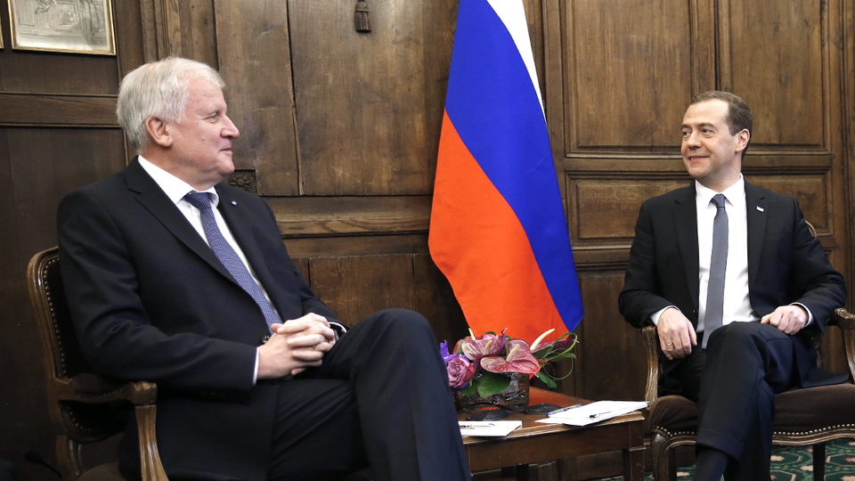 Беседа Дмитрия Медведева с премьер-министром Баварии Хорстом Зеехофером